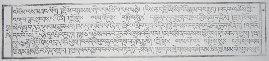 Descripción: Texto tibetano. Fuente: Foto tomada por Rodrigo Uría el 22 de septiembre de 2005. Copyright: © 2005 Rodrigo Uría, publicada bajo la licencia cc-by-sa-2.5